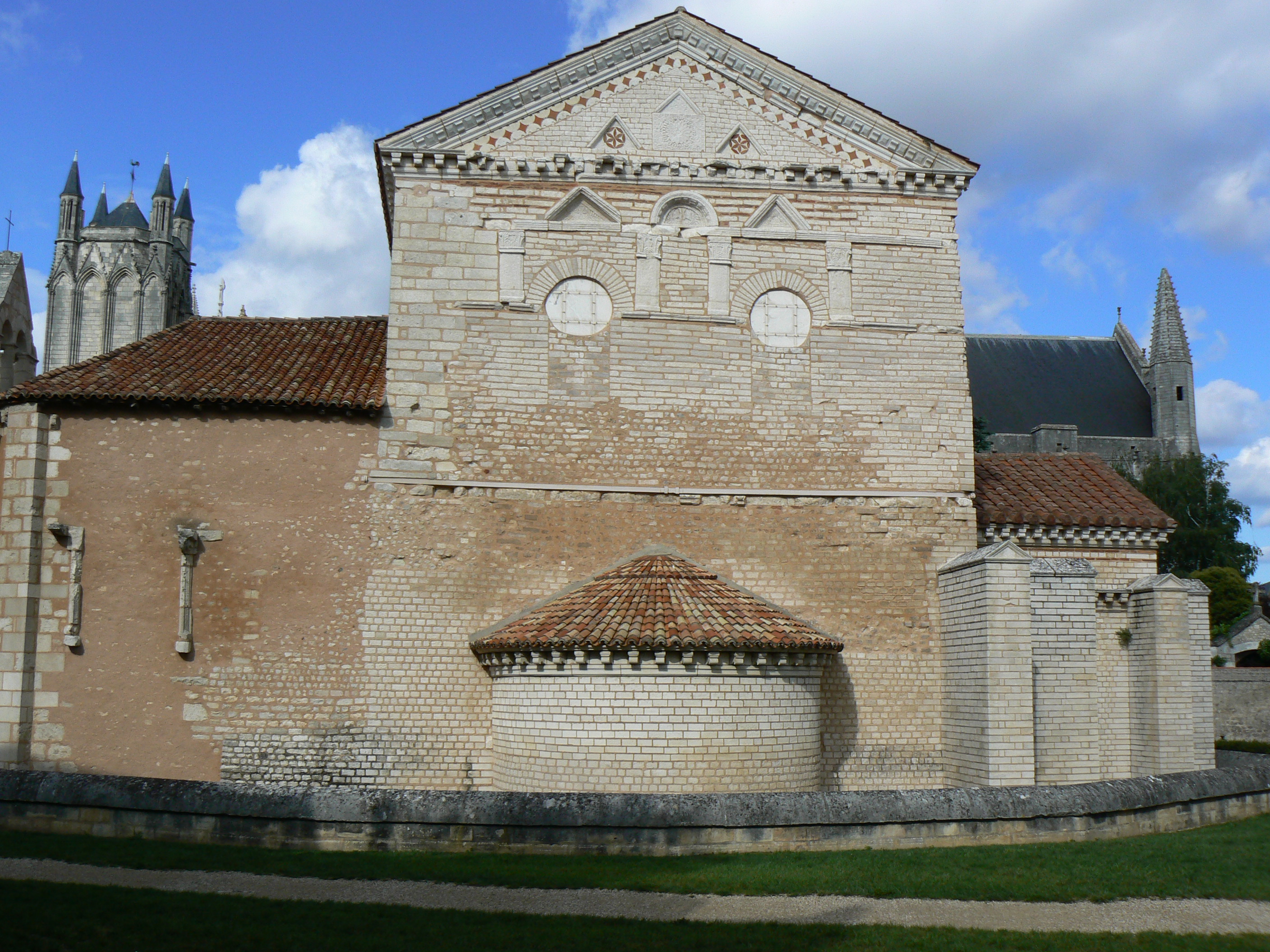 Vue du côté sud, avec la cathédrale Saint Pierre en arrière plan. Le triplet constitué d'un arc central plein cintre et de deux arcs en mitre est positionné juste au-dessus, côté intérieur, du triplet constitué à l'inverse d'un arc central en mitre et de deux arcs plein cintre.